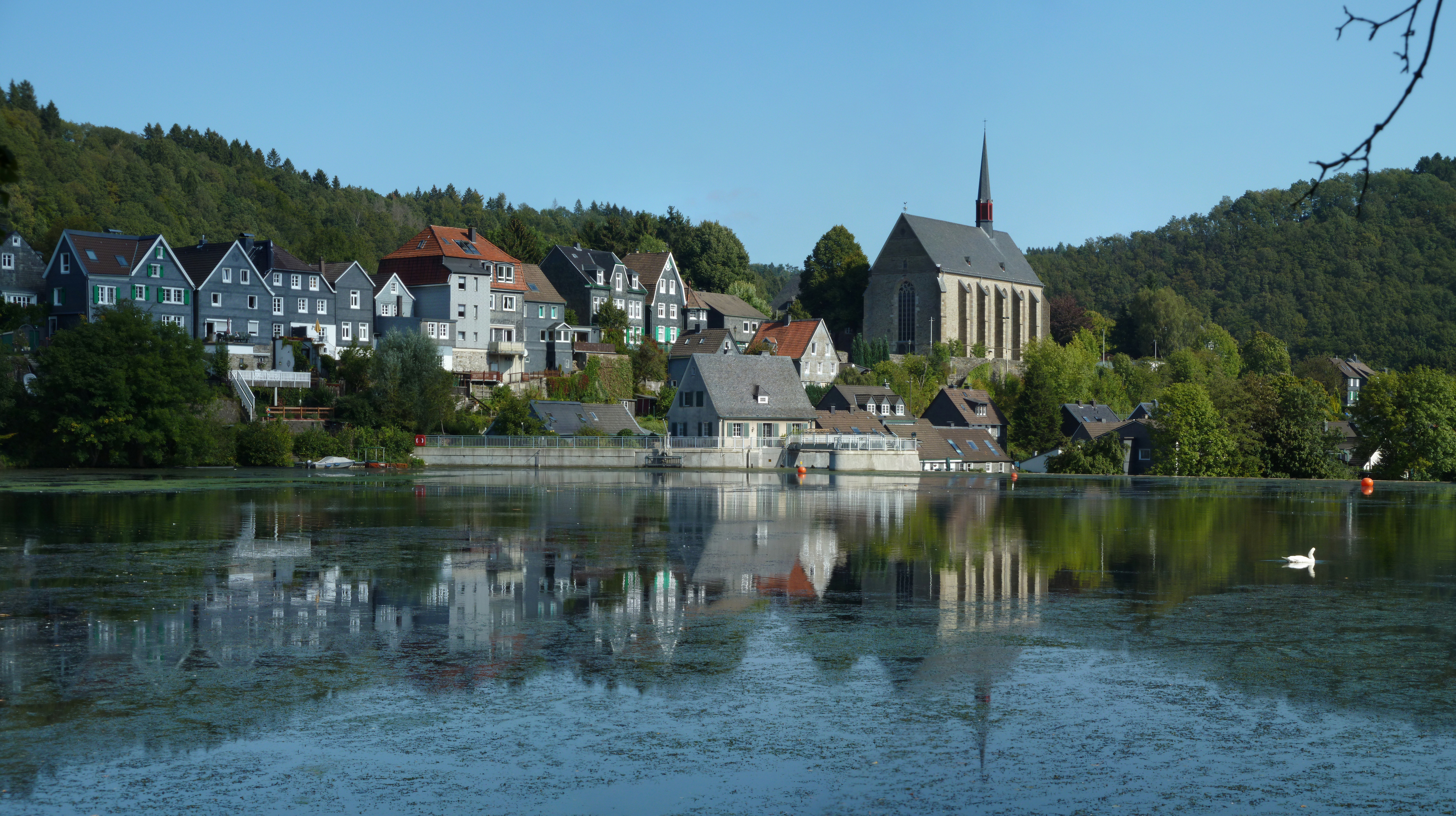 Beyenburger Freiheit und Klosterkirche, WuppertalThis is a photograph of an architectural monument. 238